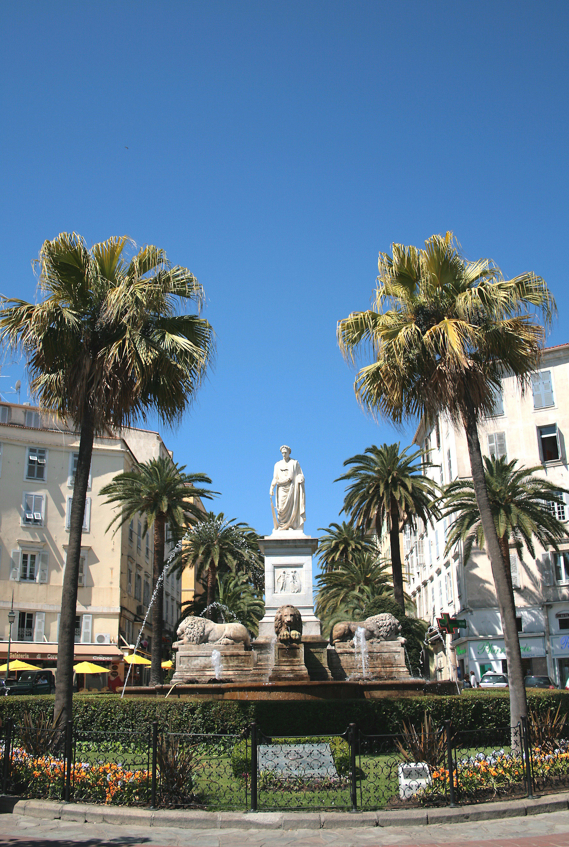 Ajaccio France, la place du Maréchal-Joffre (ou des Palmiers) et sa statue de marbre blanc de Napoléon Bonaparte Premier consul (œuvre de Maglioli).